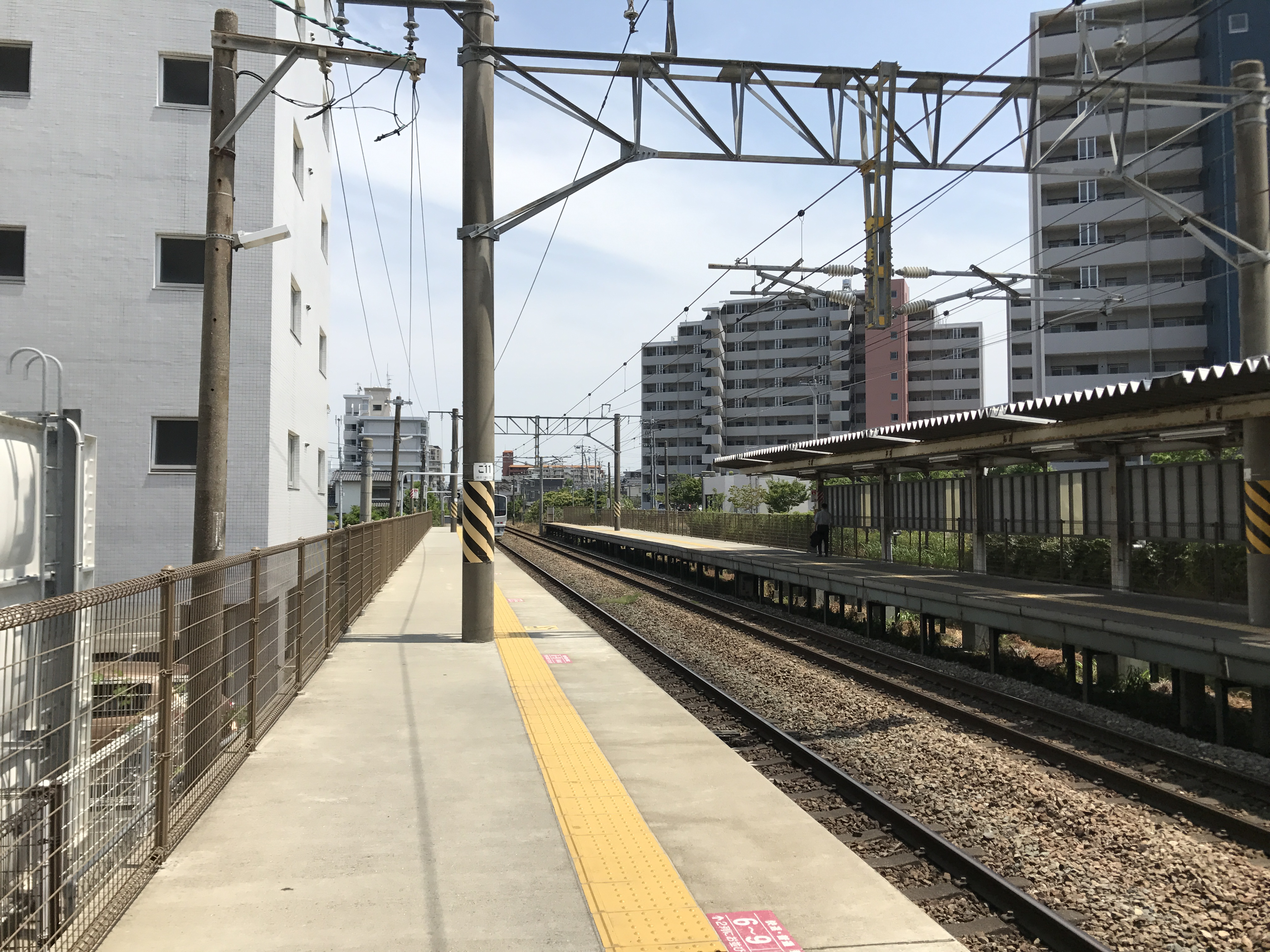 大野城駅のホーム(奥は水城方面)